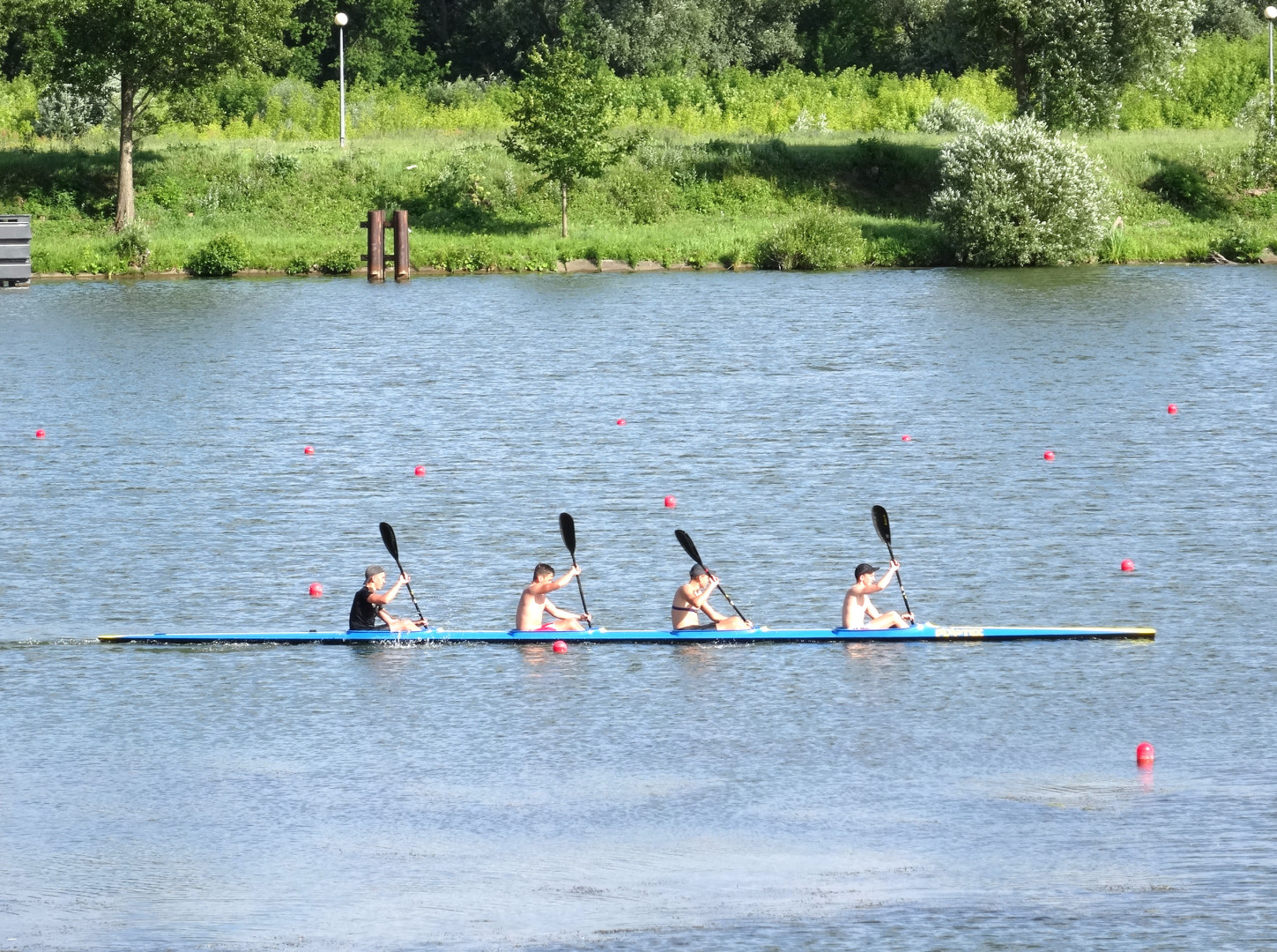 Tor regatowy w Bydgoszczy-Brdyujściu